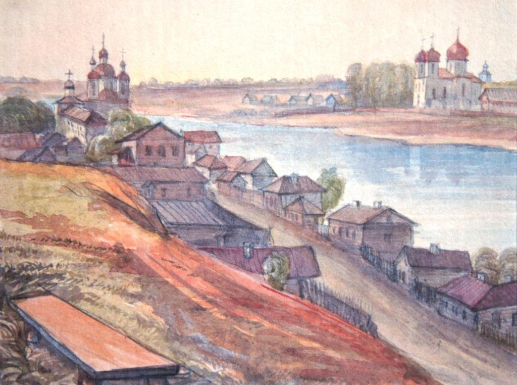 Беларуская (тарашкевіца): Полацак (Połacak), вуліца Вялікая (vulica Vialikaja), Дзьвіна і Задзьвіньне